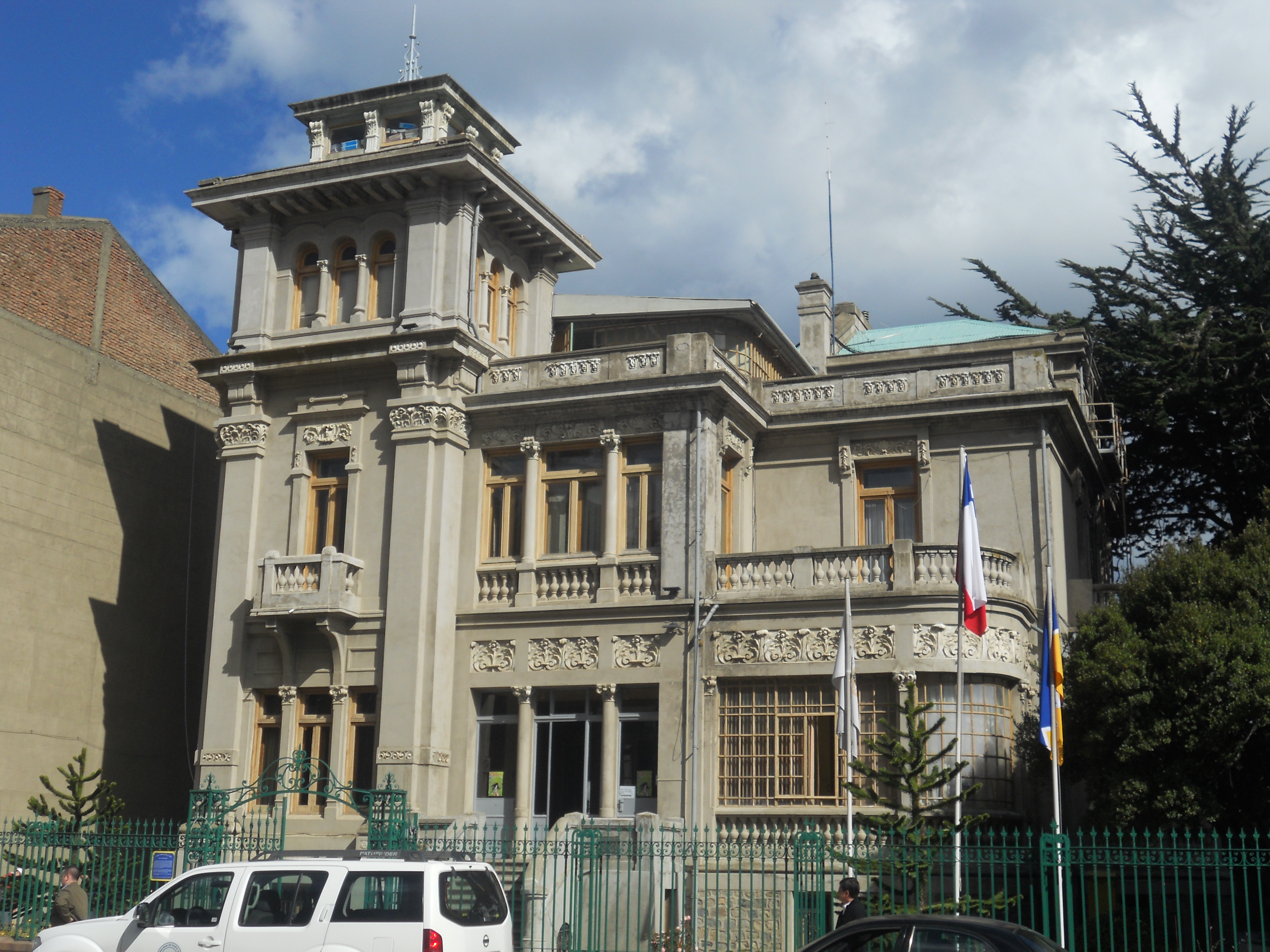 Palacio José Montes a la Plaza Muñoz Gamero, Punta Arenas This is a photo of a national monument in Chile: 191